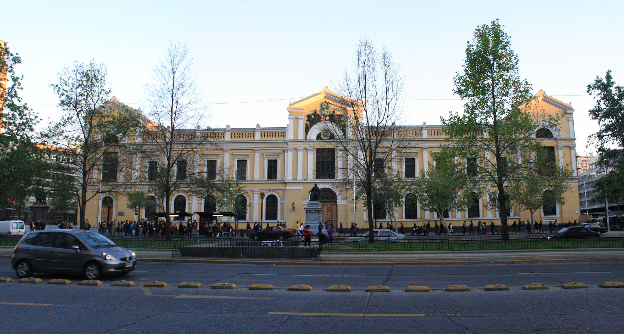 Universidad de Chile, Santiago